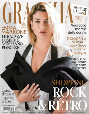 Copertina della rivista Grazia 25 gennaio 2018, Arnoldo Mondadori Editore.